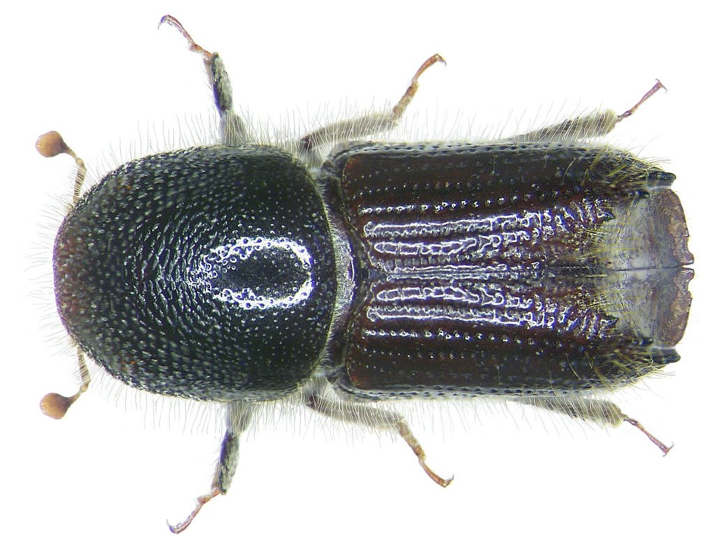 Familie: Scolytidae Groesse: 4,2-5,5 mm Verbreitung: Europa, Sibirien Ökologie: Entwicklung unter Fichtenrinde Fundort: Germania, Bayern, Oberfranken, Kulmbach leg.det. U.Schmidt, 1976 Photo: U.Schmidt, 2005